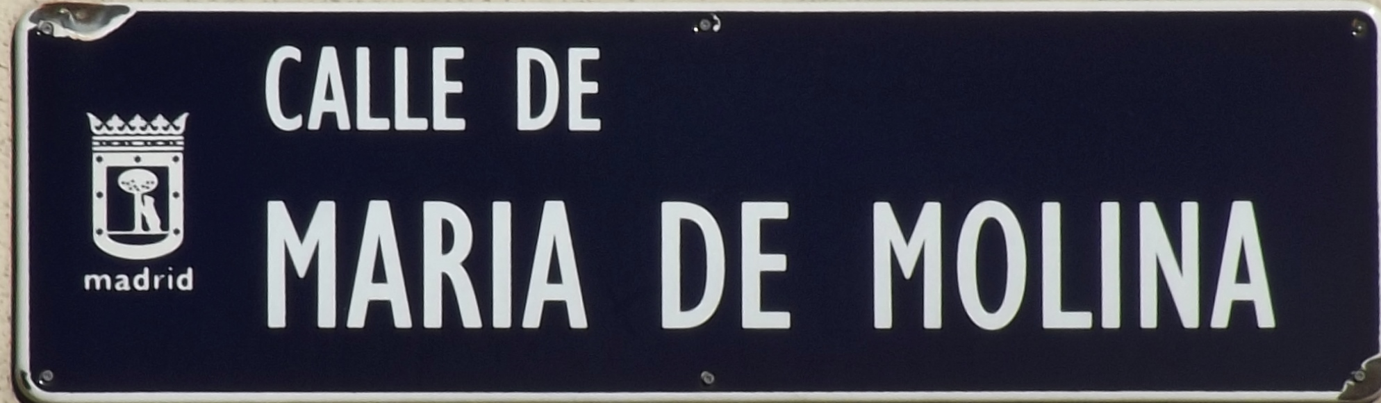 Placa de la calle de María de Molina, Madrid.